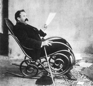 Alejandro Korn. En su casa en el Hospital de Melchor Romero